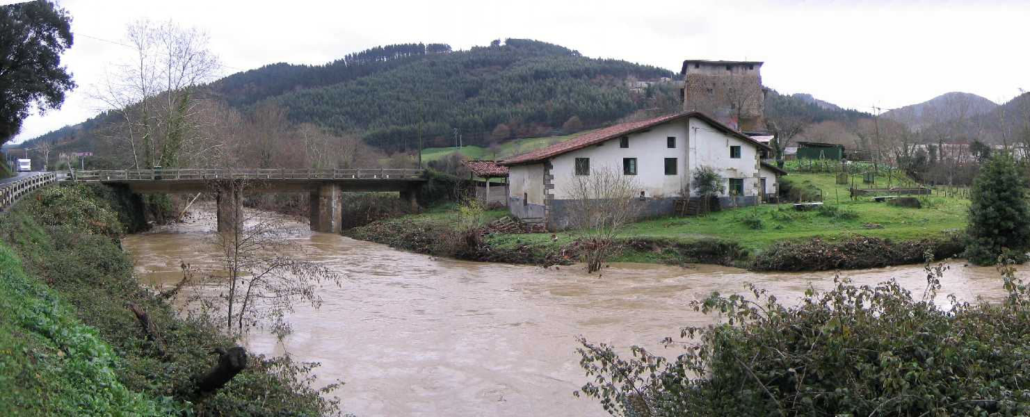 Río Aribai a su paso por Aranzibia Berriatúa, Vizcaya, España.